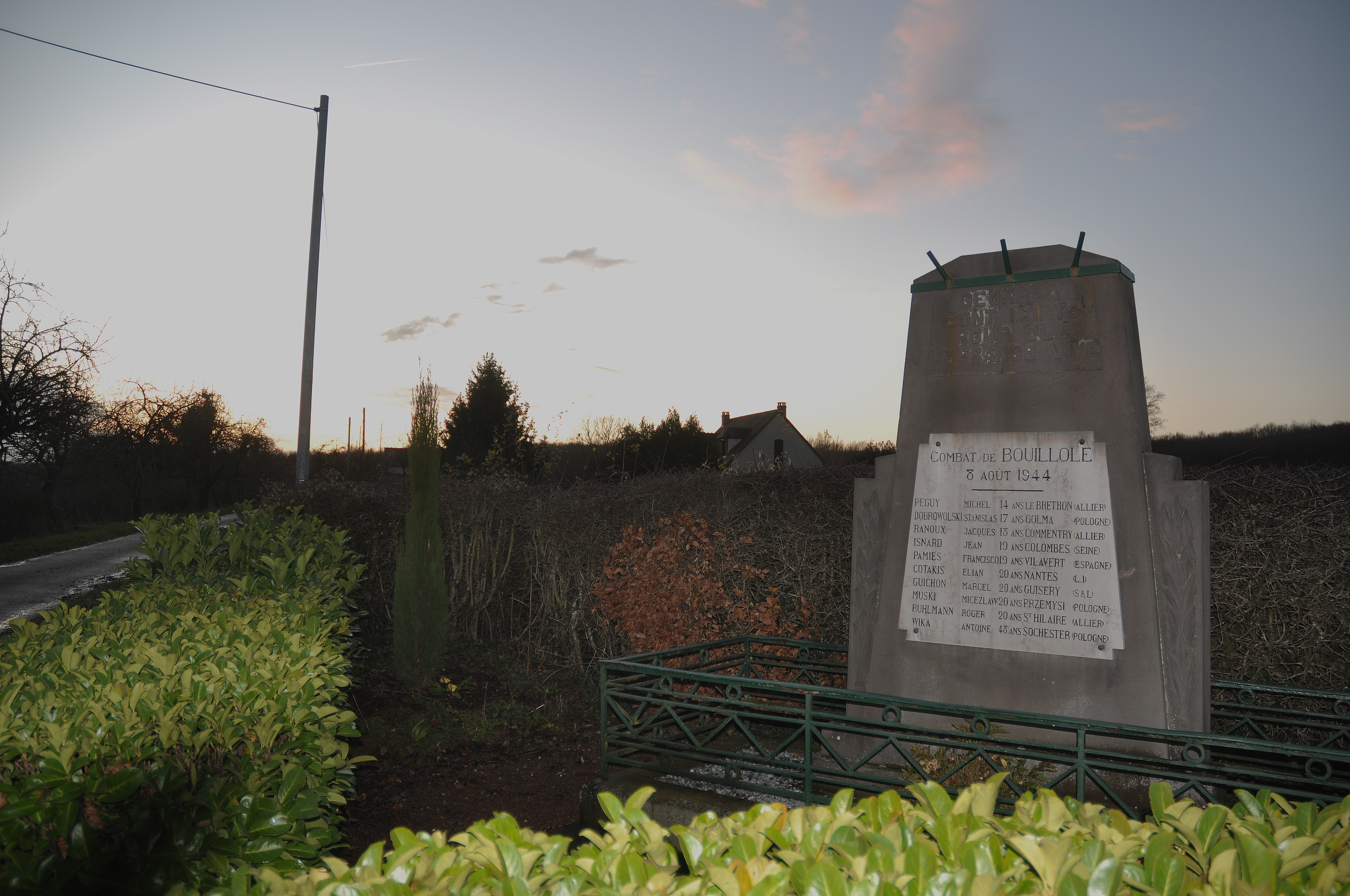 Cette stèle, située sur la commune de Saint Plaisir (Allier, France) est placée en mémoire des dix jeunes résistants tués par les nazis en 1944.